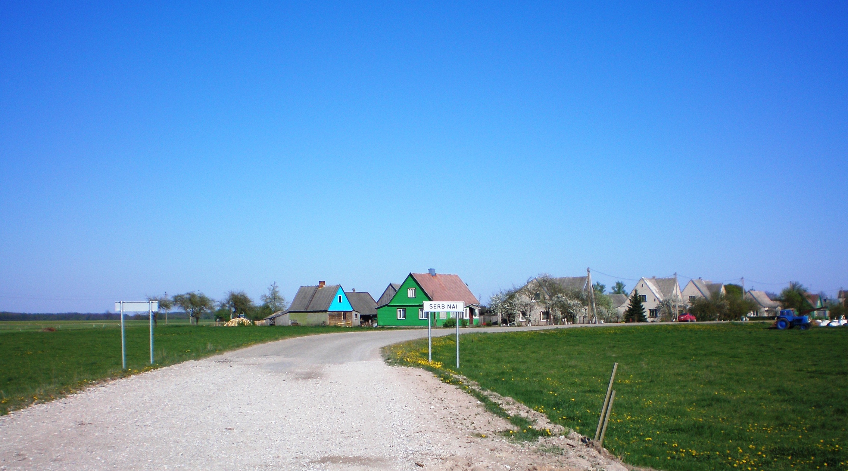 Serbinai, Kėdainių raj.